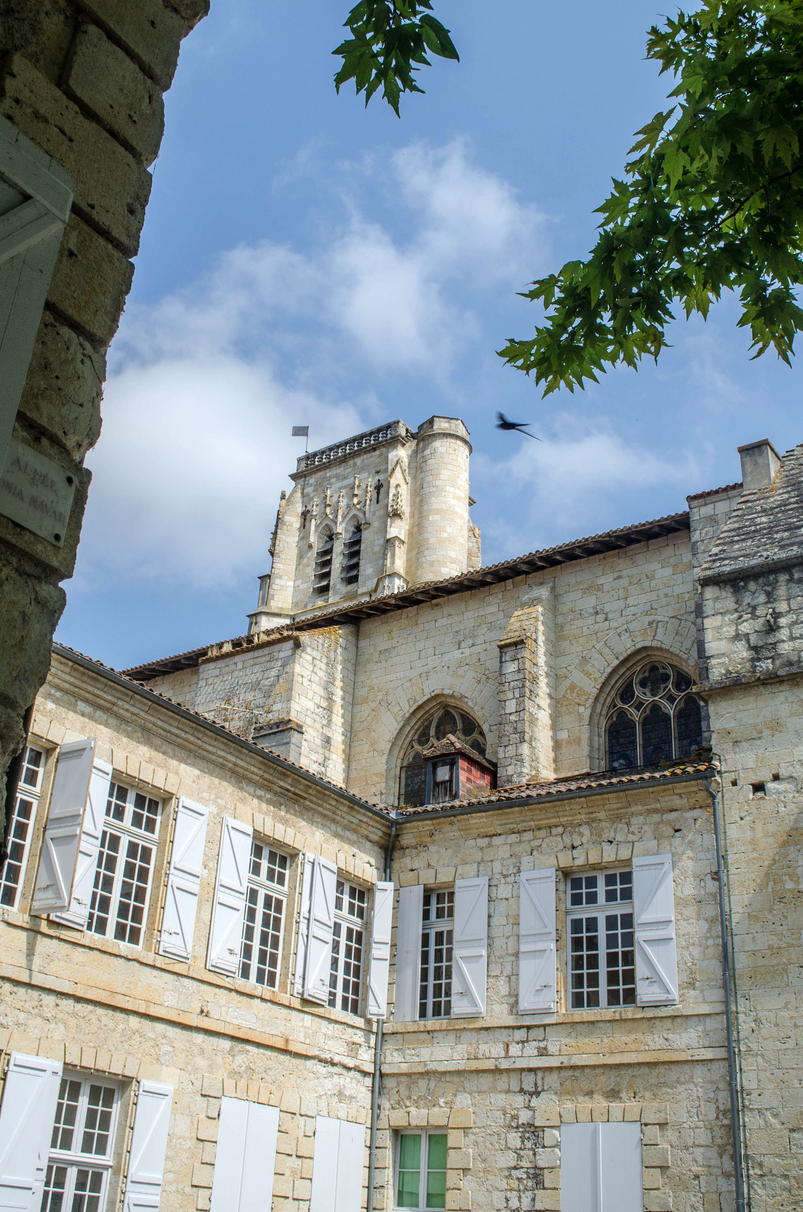 Lectoure (Gers, France), cathédrale et bâtiments de l’hôtel de ville vus du jardin des Marronniers